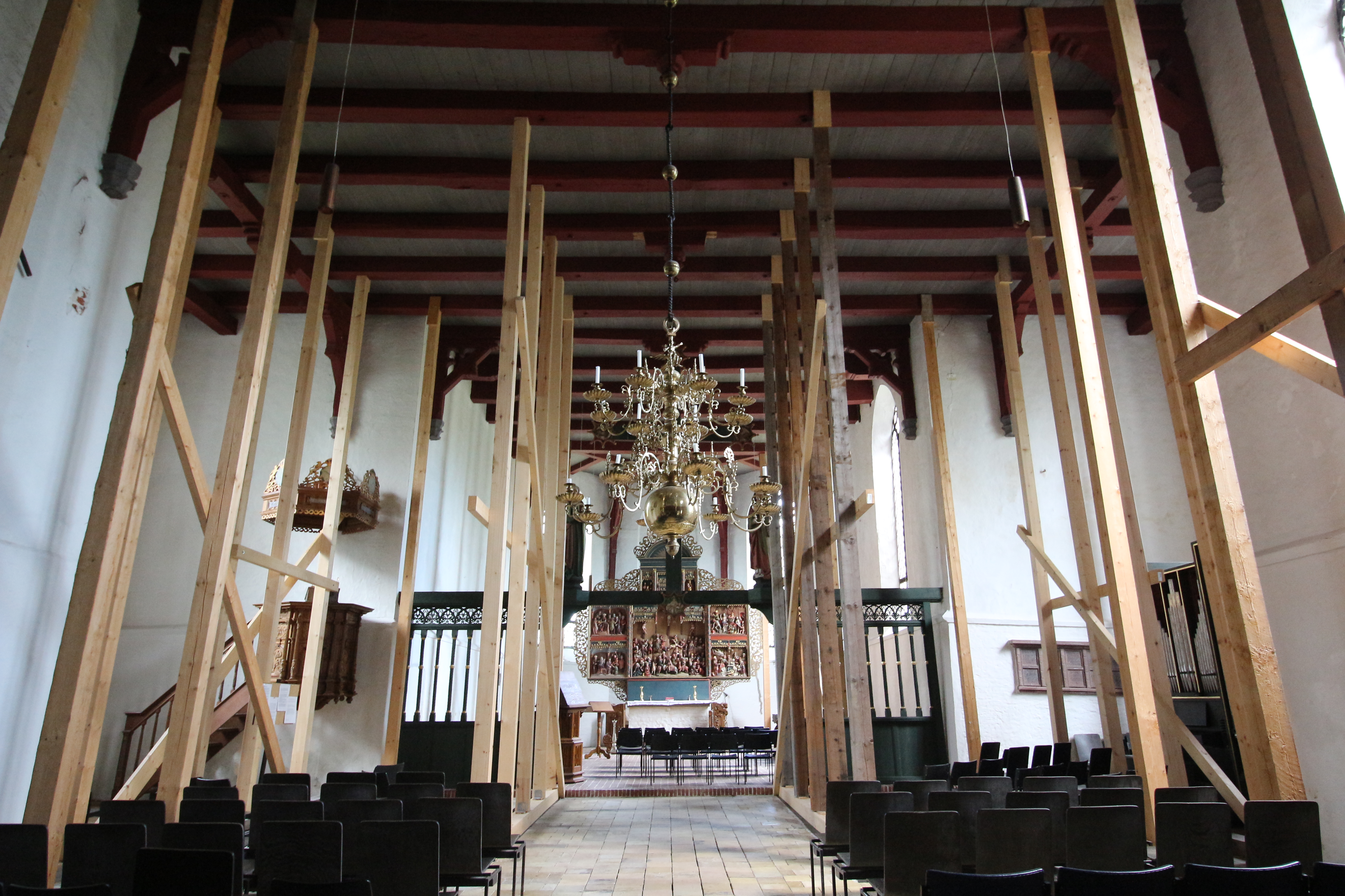 Innenraum der St.-Nikolai-Kirche in Kotzenbüll, wegen akuter Einsturzgefahr abgestützt